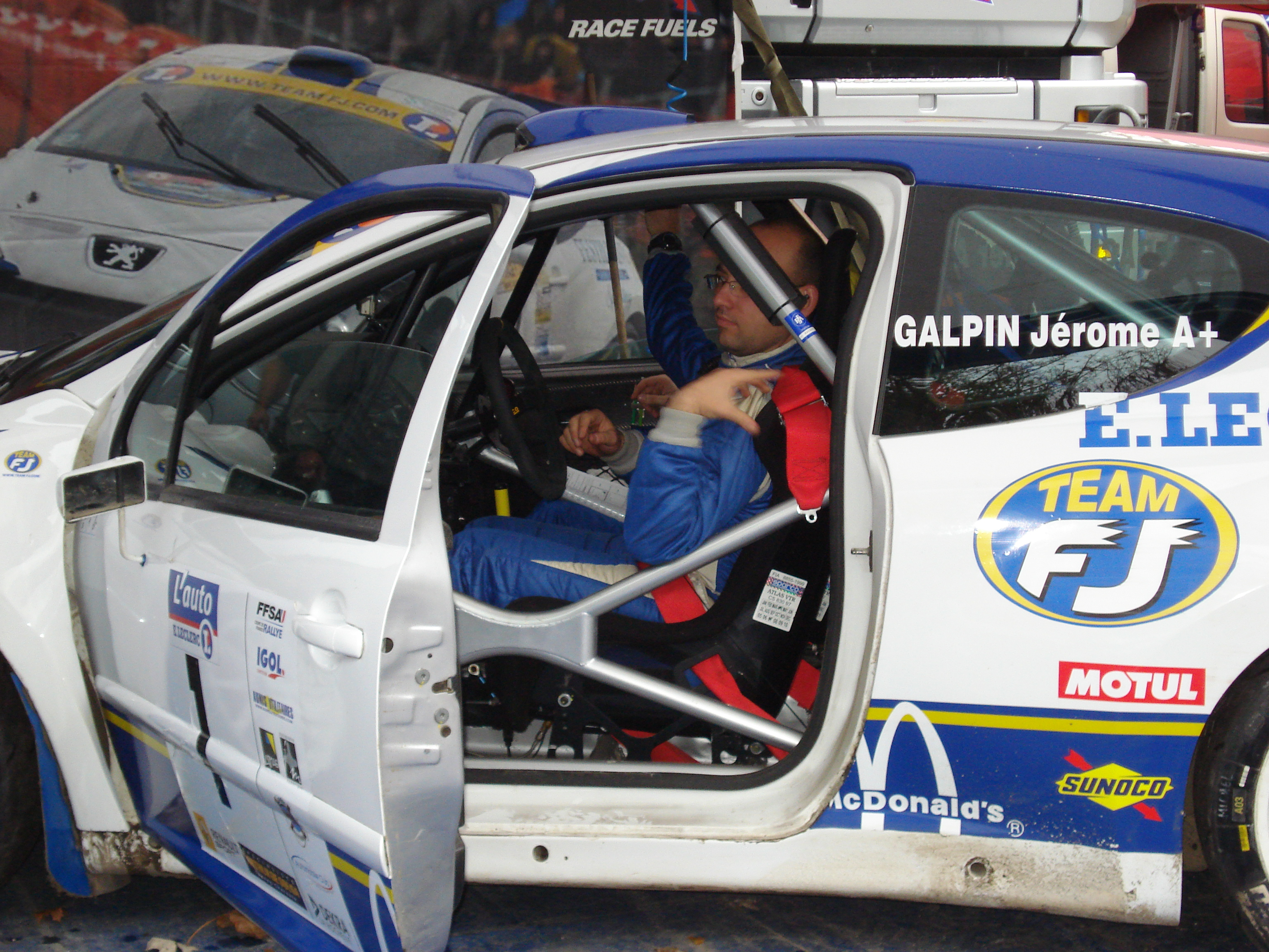 Jérôme Galpin vainqueur du Rallye d'Automne 2010